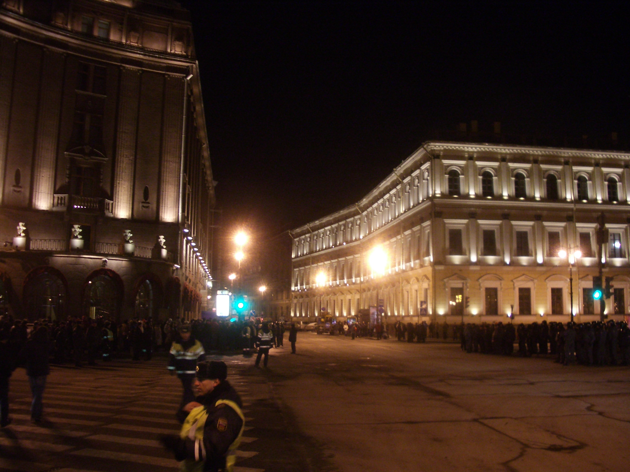 Протестующие и ОМОН. 21:20